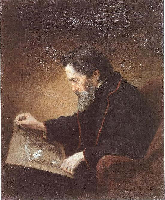 Antoine Chintreuil, peint par Jean Desbrosses